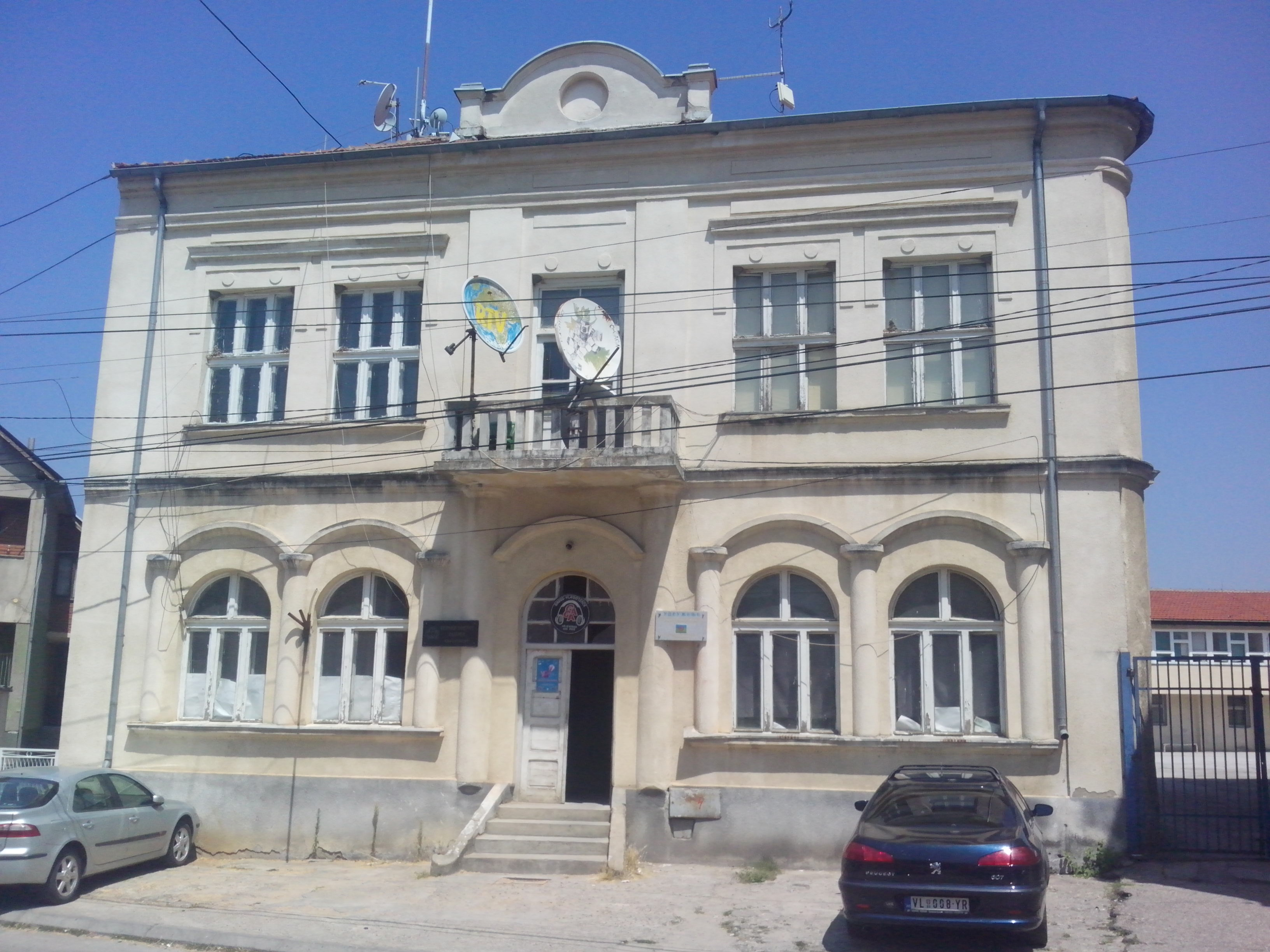 Српски (ћирилица): Народни дом Власотинце